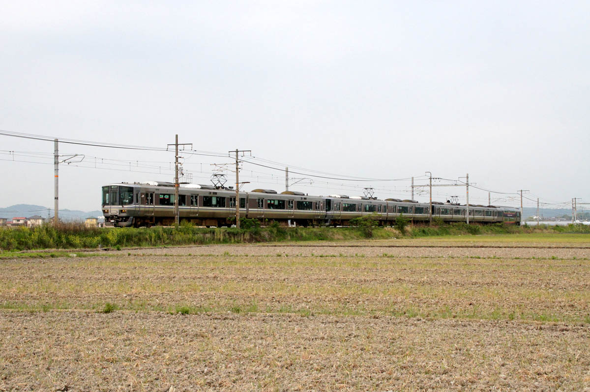 JR西日本223系5000番台+JR四国5000系 快速「マリンライナー」（瀬戸大橋線）、岡山市南区